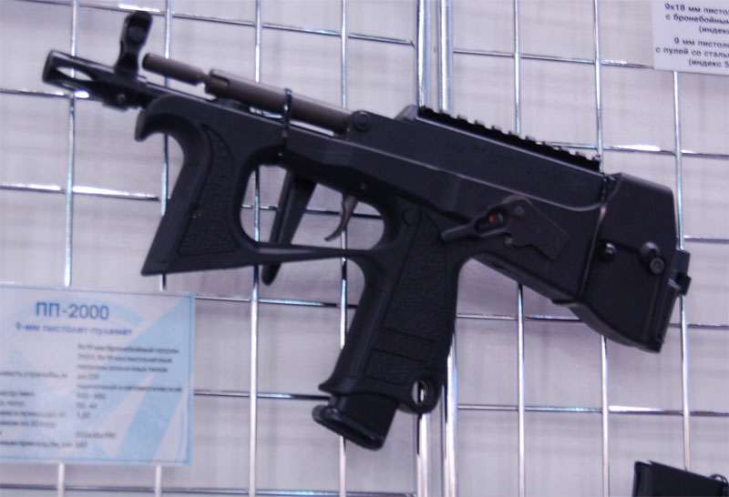 Пистолёт-пулемёт ПП2000. МАКС-2009